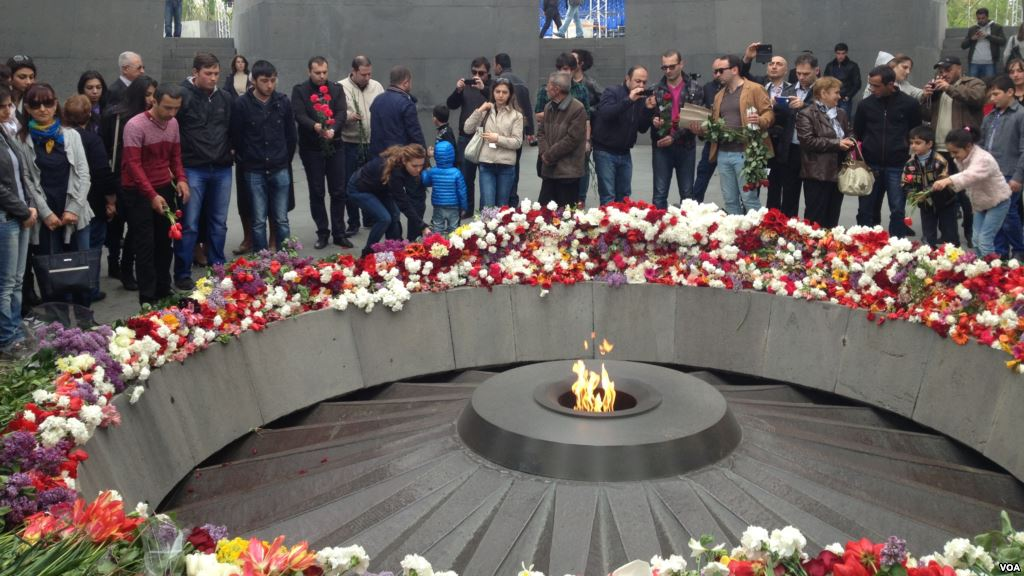 Ermenistan'nı başkenti Erivan'daki Soykırım Müzesi'nde gerçekleştirilen 100. yıl anma töreninden bir kare.